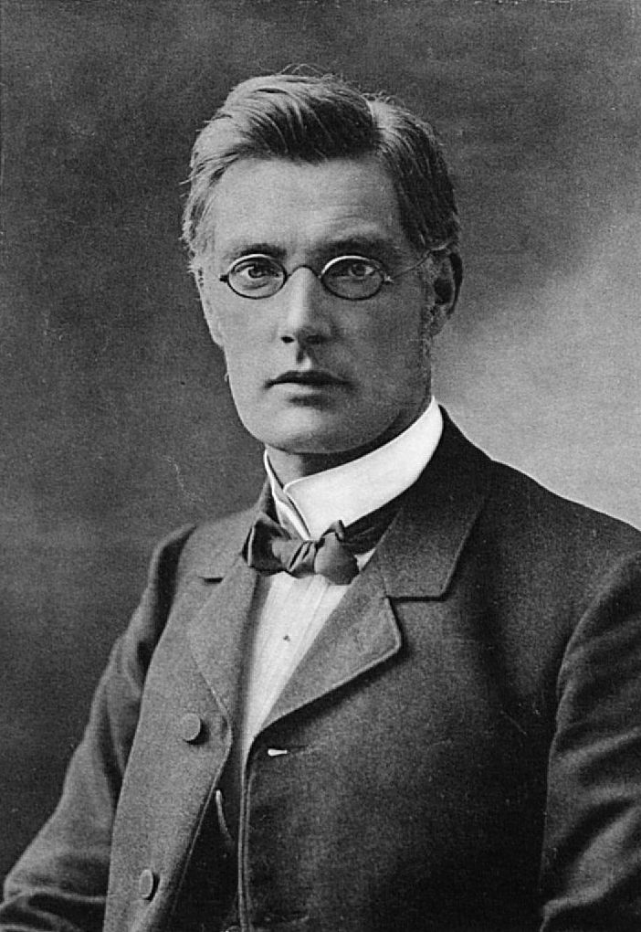 Paul Althaus (1861-1925), deutscher evangelischer Theologe